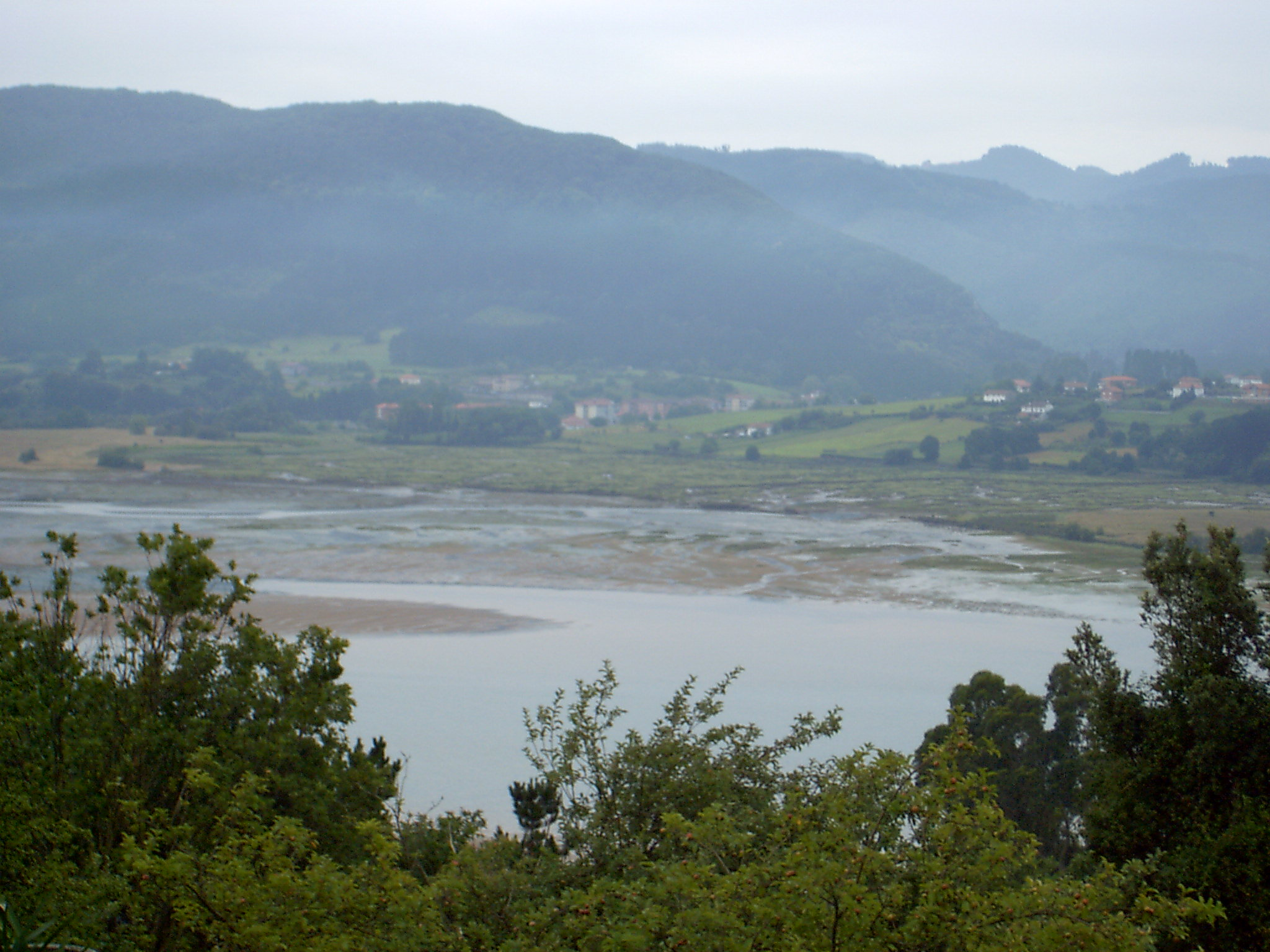 Urdaibai landscape